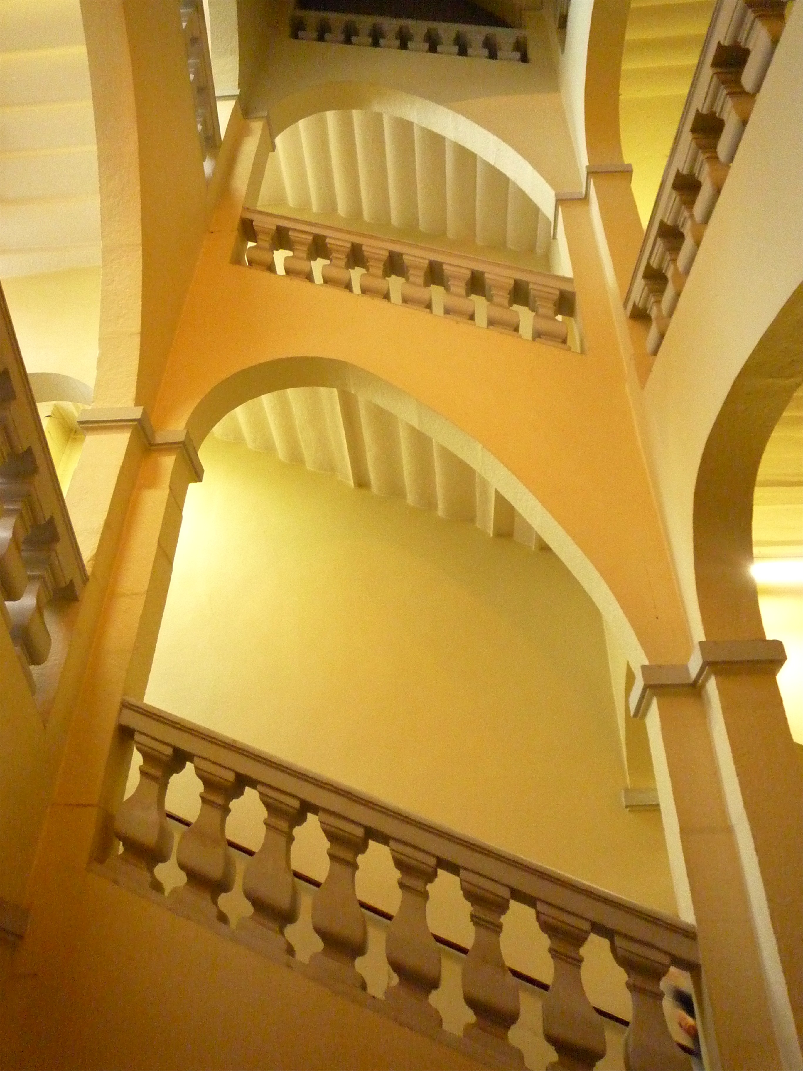 Escalier d'honneur du couvent des Minimes de Grenoble